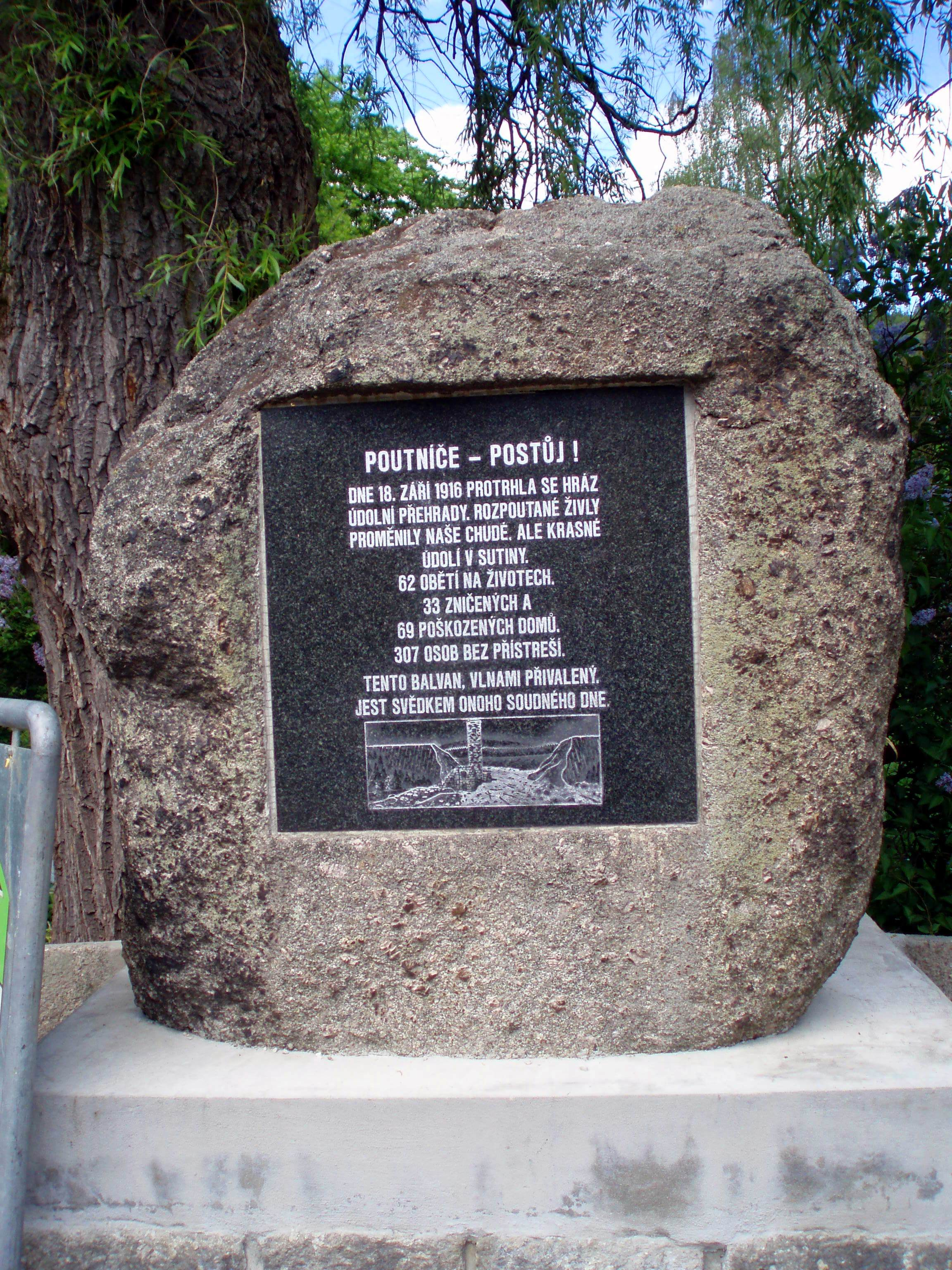 Gedenkstein an die Opfer des Talsperrenbruchs 1916